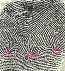 Daktiloskopia - Ulnar